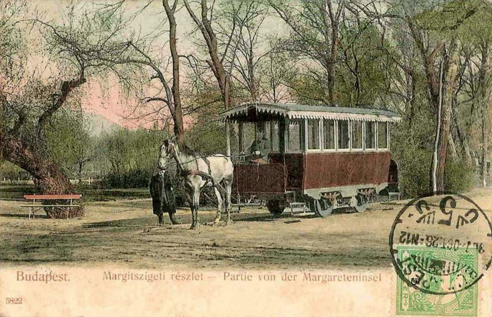 Margitszigeti lóvasút régi képeslapon